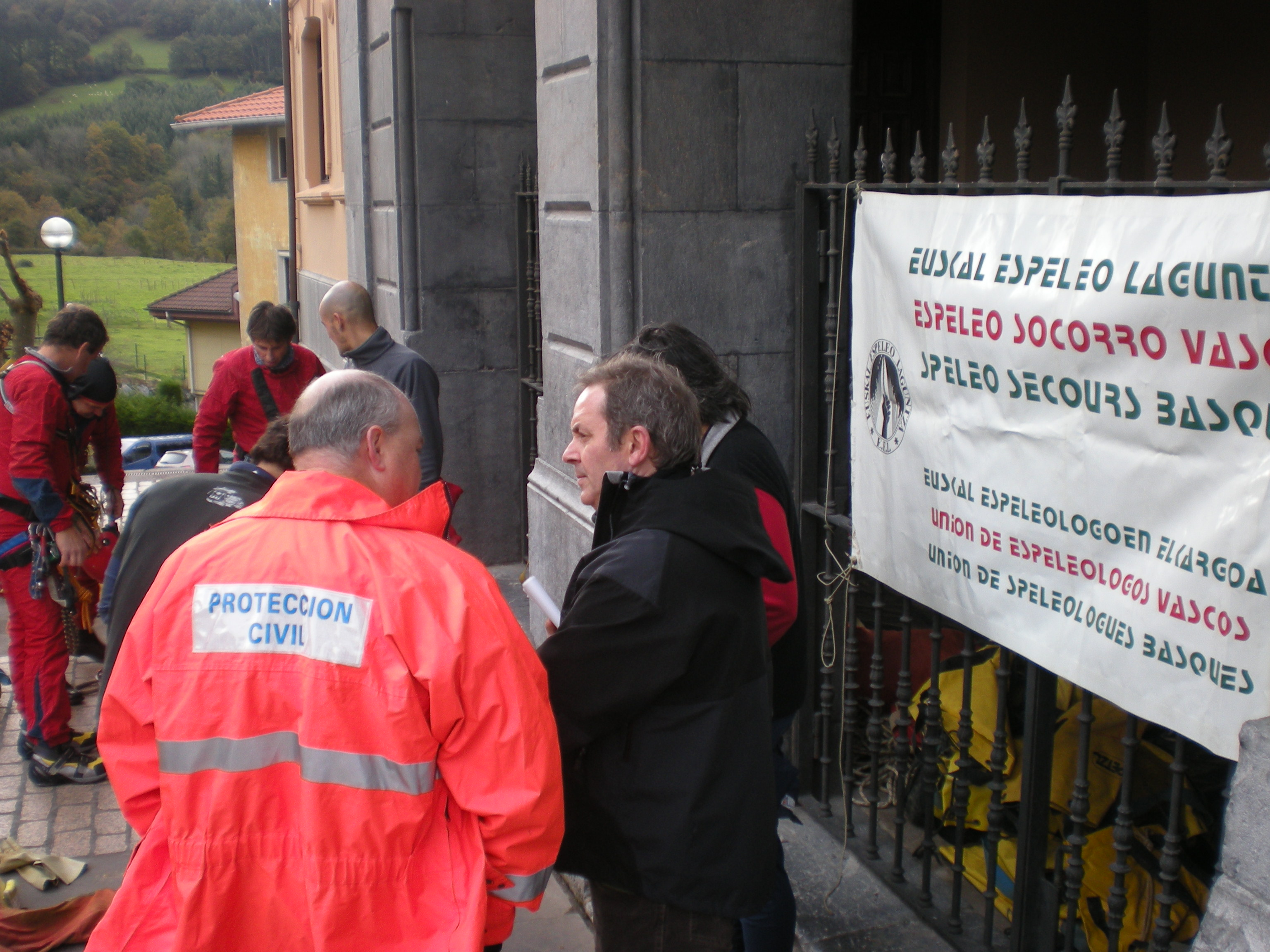 Euskal Espeleo Laguntza taldearen simulakro orokorra 2010ean (Artekonako leizea, Galdames, Bizkaia).